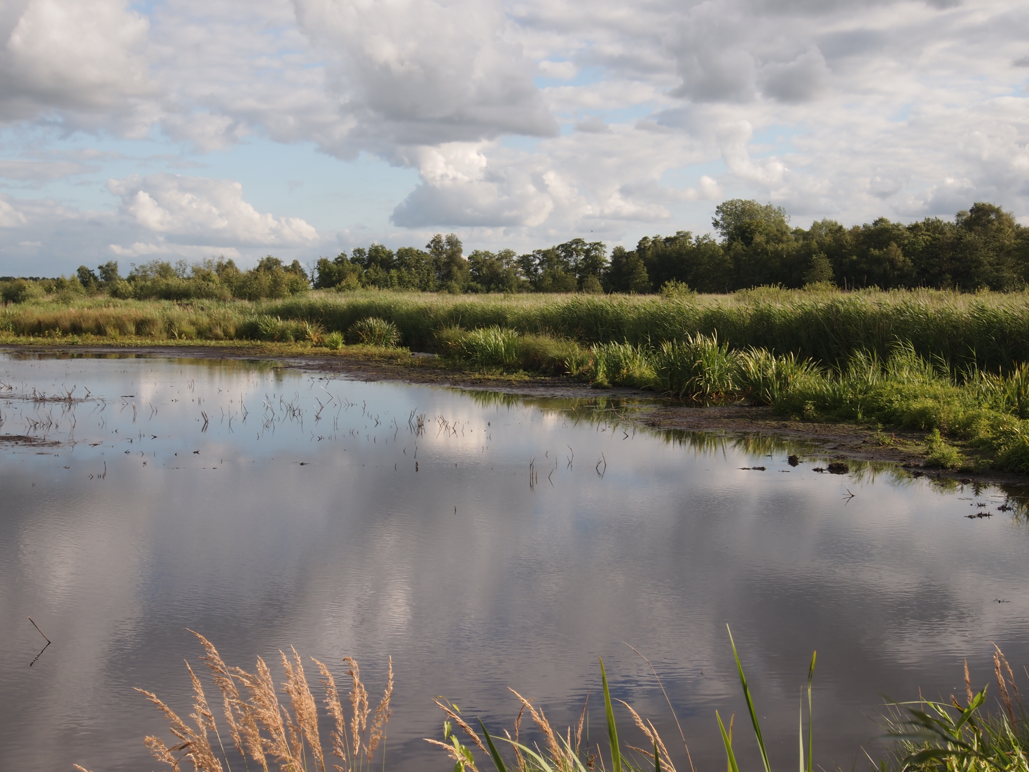 Een mooie dag in de AldeFeanen This is a photo or sound file made in De Alde Feanen National Park in the Netherlands, with the main subject of the file in the category: landscapes